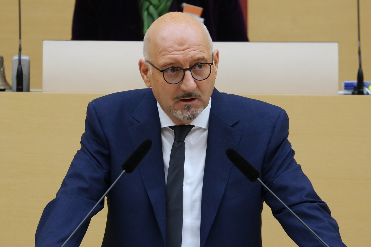 Manfred Eibl, deutscher Politiker (Freie Wähler), seit der Landtagswahl 2018 Abgeordneter im Bayerischen Landtag. Hier am 21. Februar 2019 während der 'Aktuellen Stunde' im Bayerischen Landtag. Titel des Werks: "Manfred Eibl (Freie Wähler) - 02/2019"